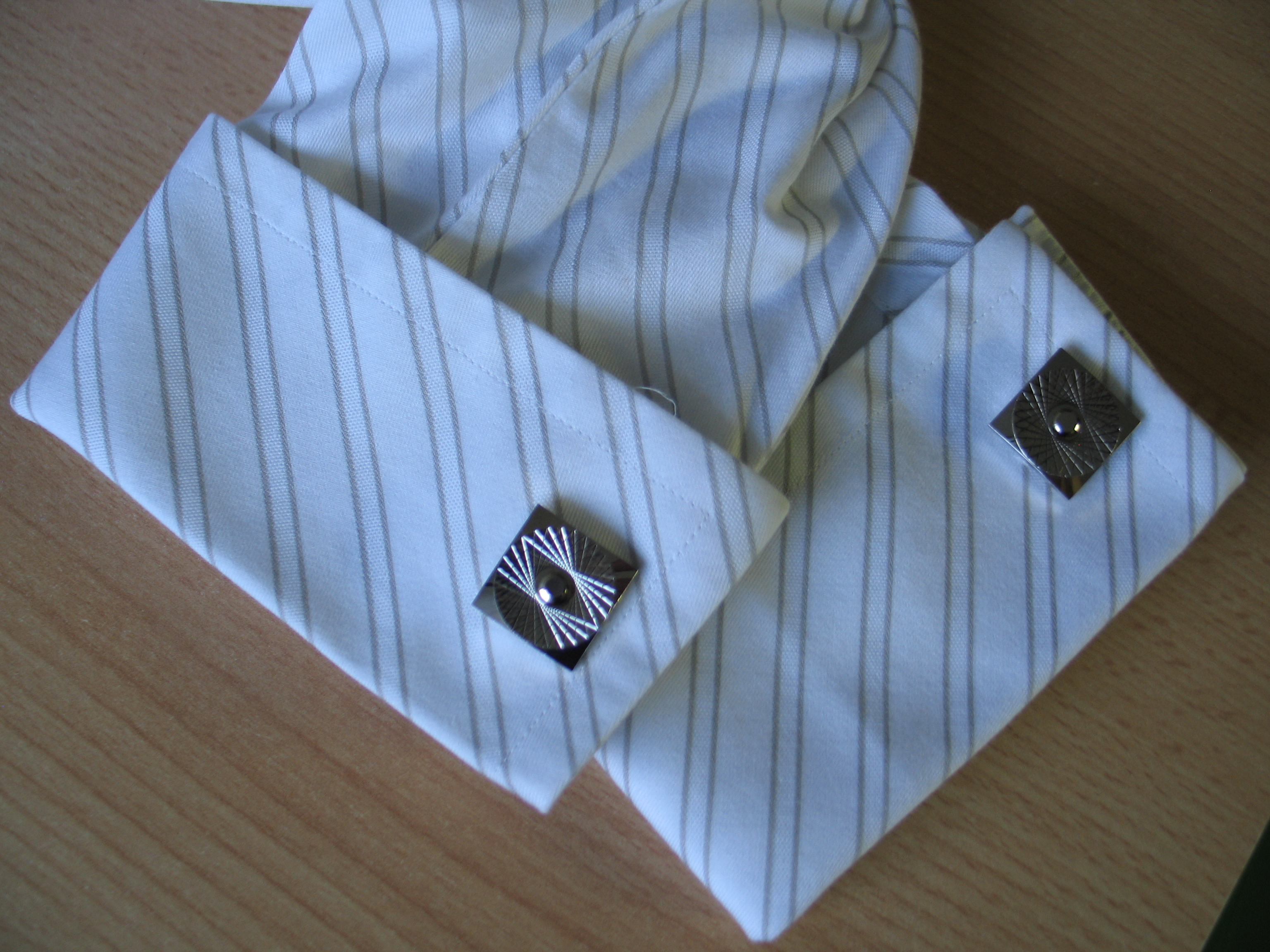 Manšetni gumbi.